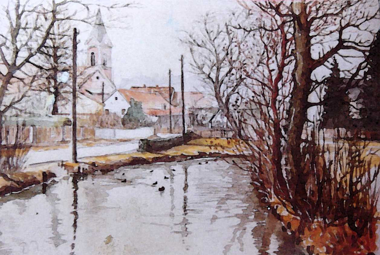 Blick auf die Olchinger Kirche vom Mühlbach. Aquarell von Emmi Schmitt